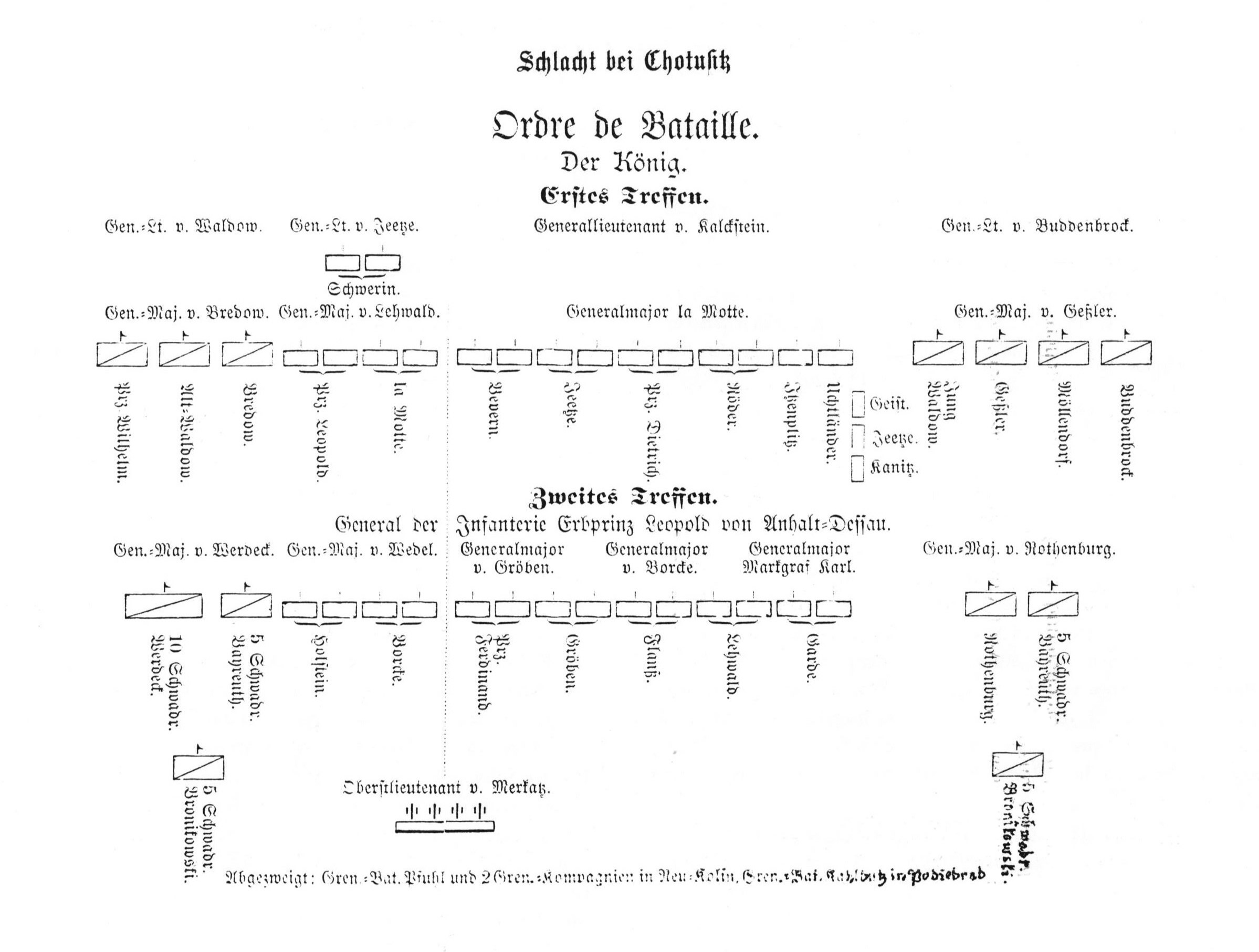 Schlacht bei Chotusitz, Ordre de Bataille, Preußen